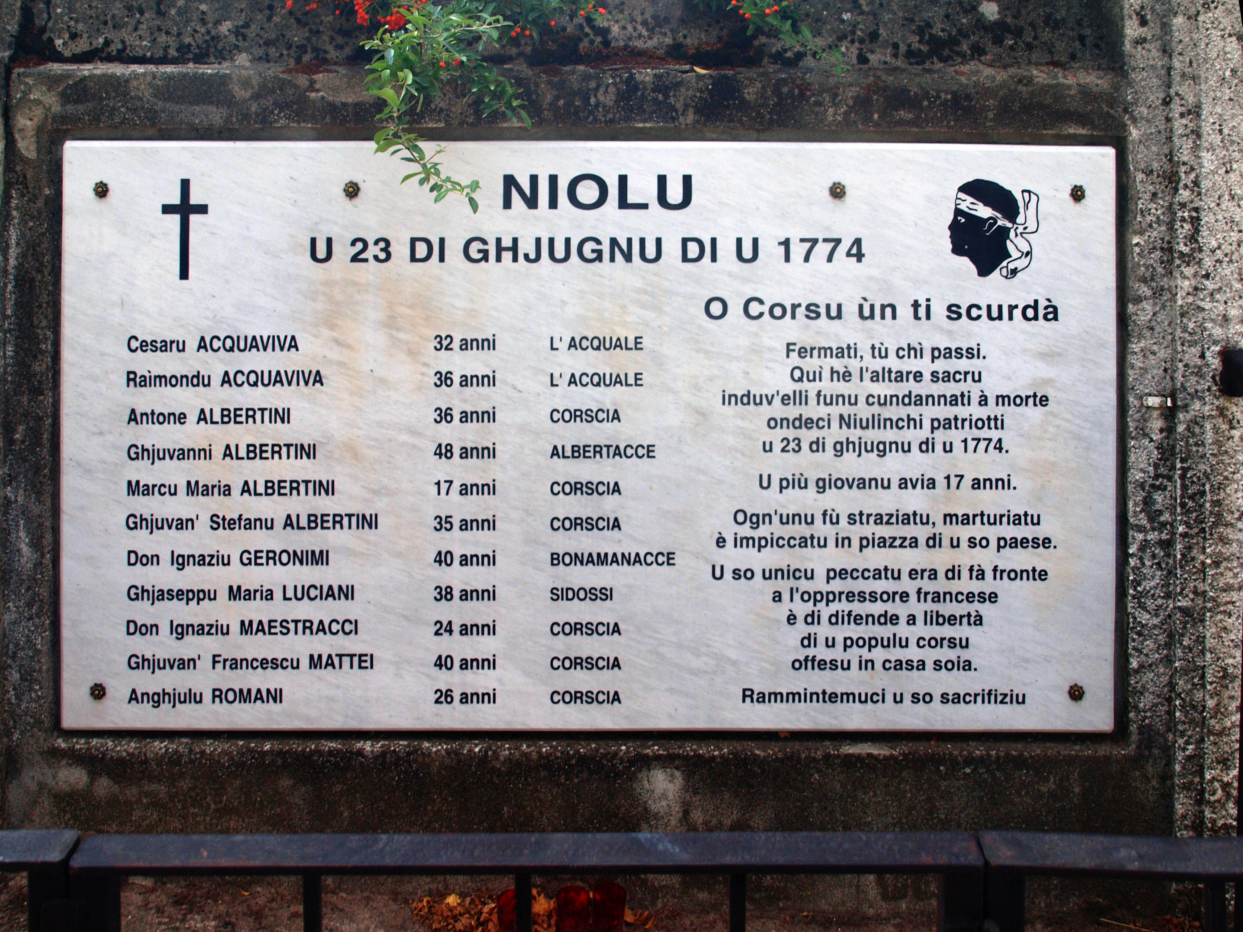 Calacuccia (Corsica) - Plaque commémorative à l'entrée du couvent Saint-François